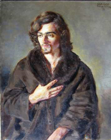 Photo d'un tableau ("Jeune homme au manteau") dont je suis l'ayant-droit.